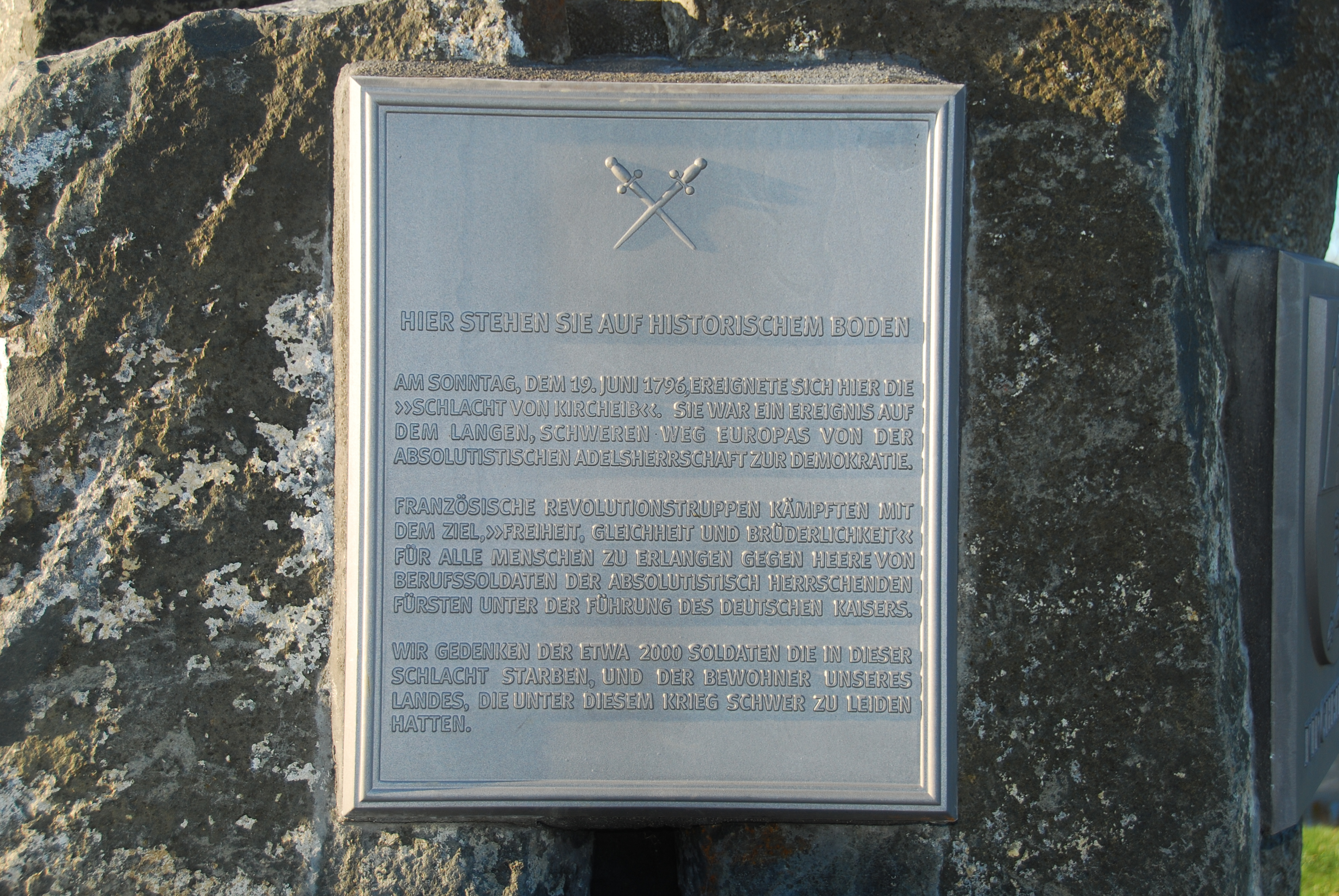 Zur Erinnerung an die Schlacht vom 19. Juni 1796